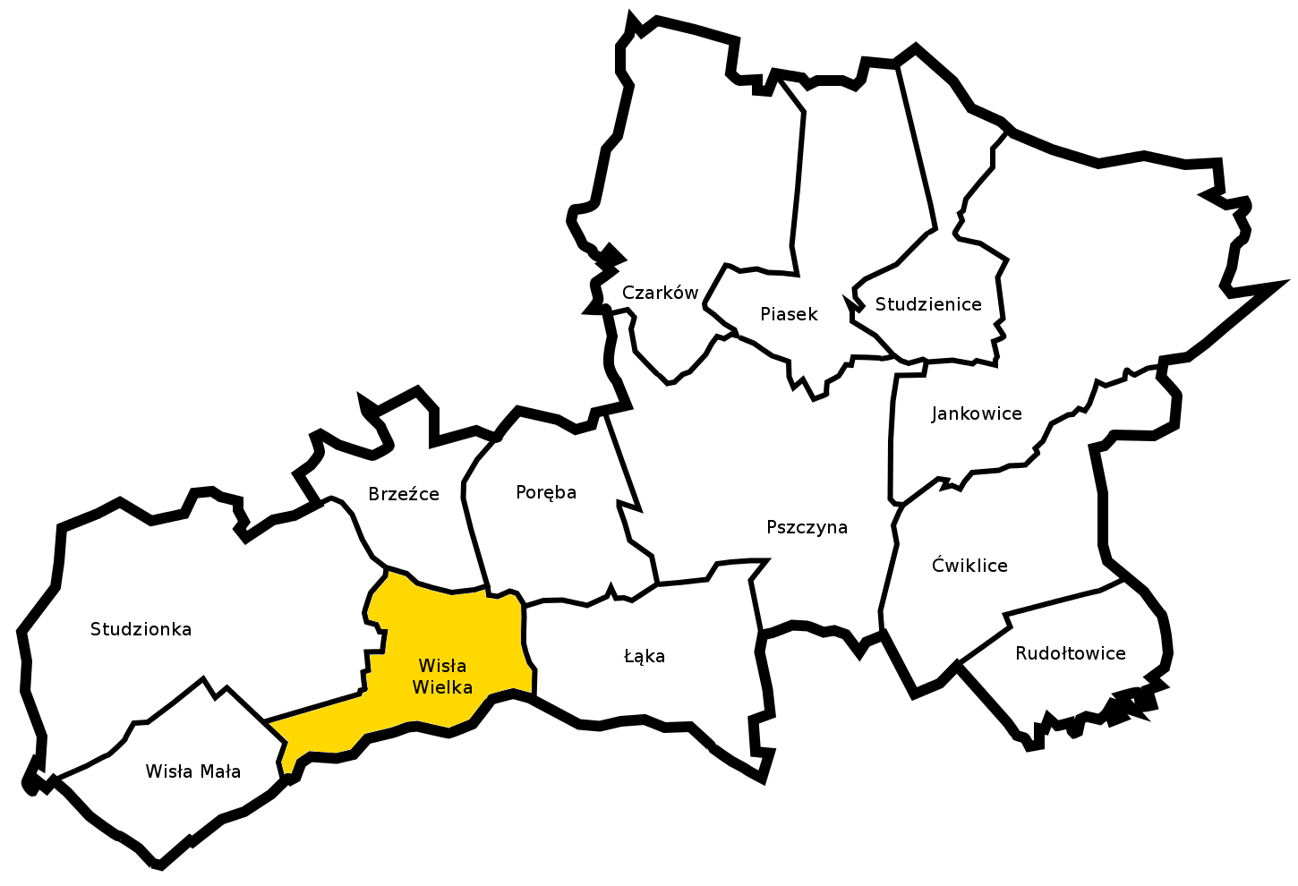 Gmina Pszczyna - sołectwo Wisła Wielka